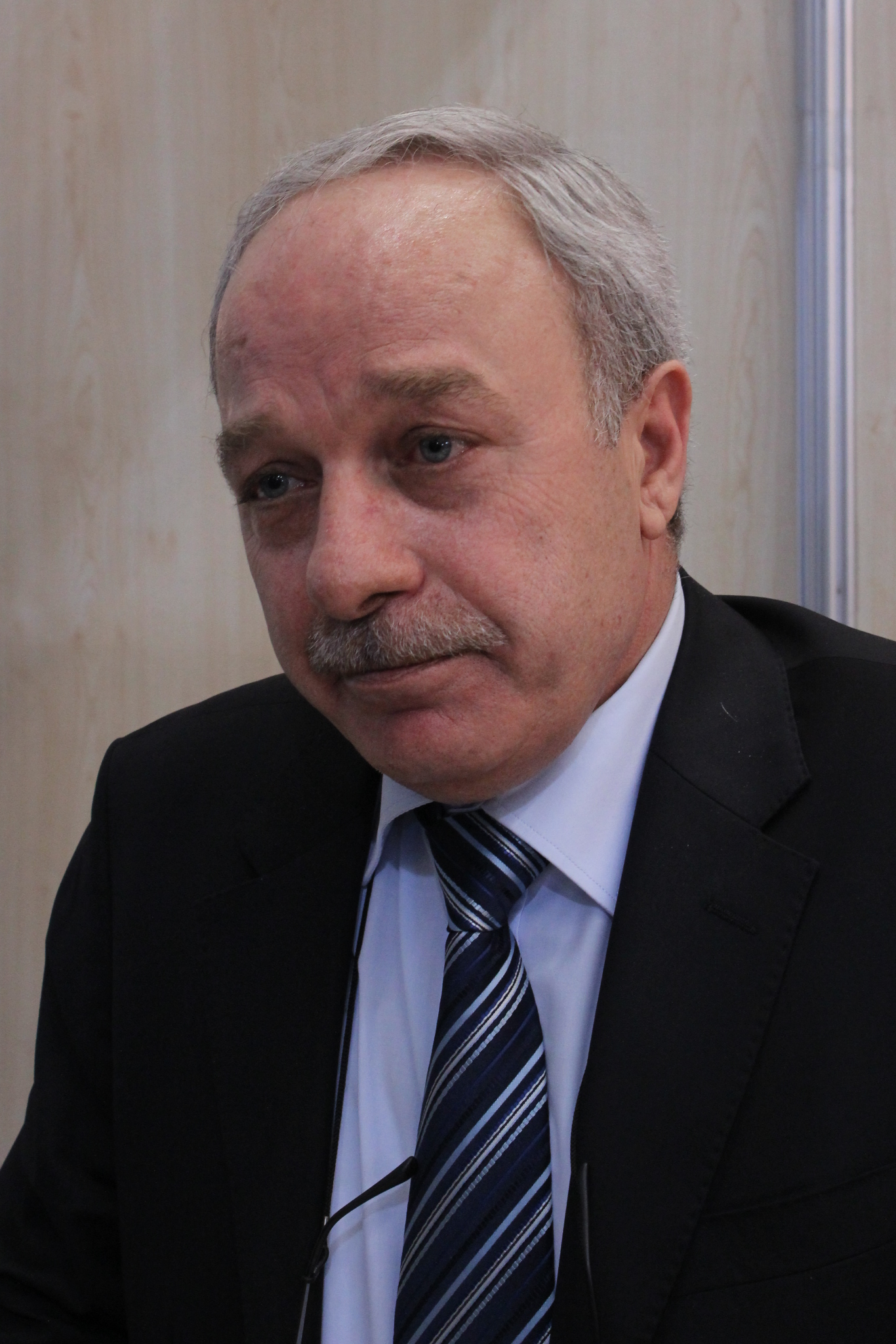 Erdal Sarızeybek, 2015 Ankara Kitap Fuarı'nda iken